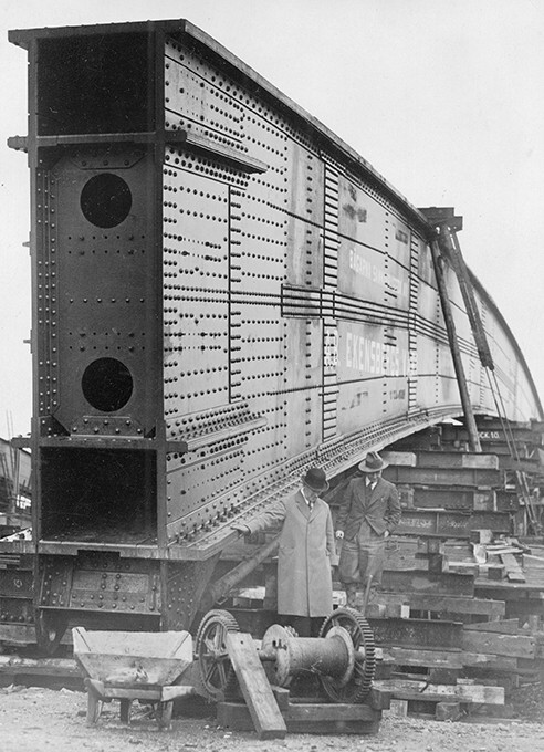 Stålbalk till Västerbron i Stockholm, tillverkad av Ekensbergs varv 1933. De båda herrarna är ingenjör Pirra och ingenjör Jacoby